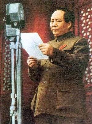 毛澤東於開國大典